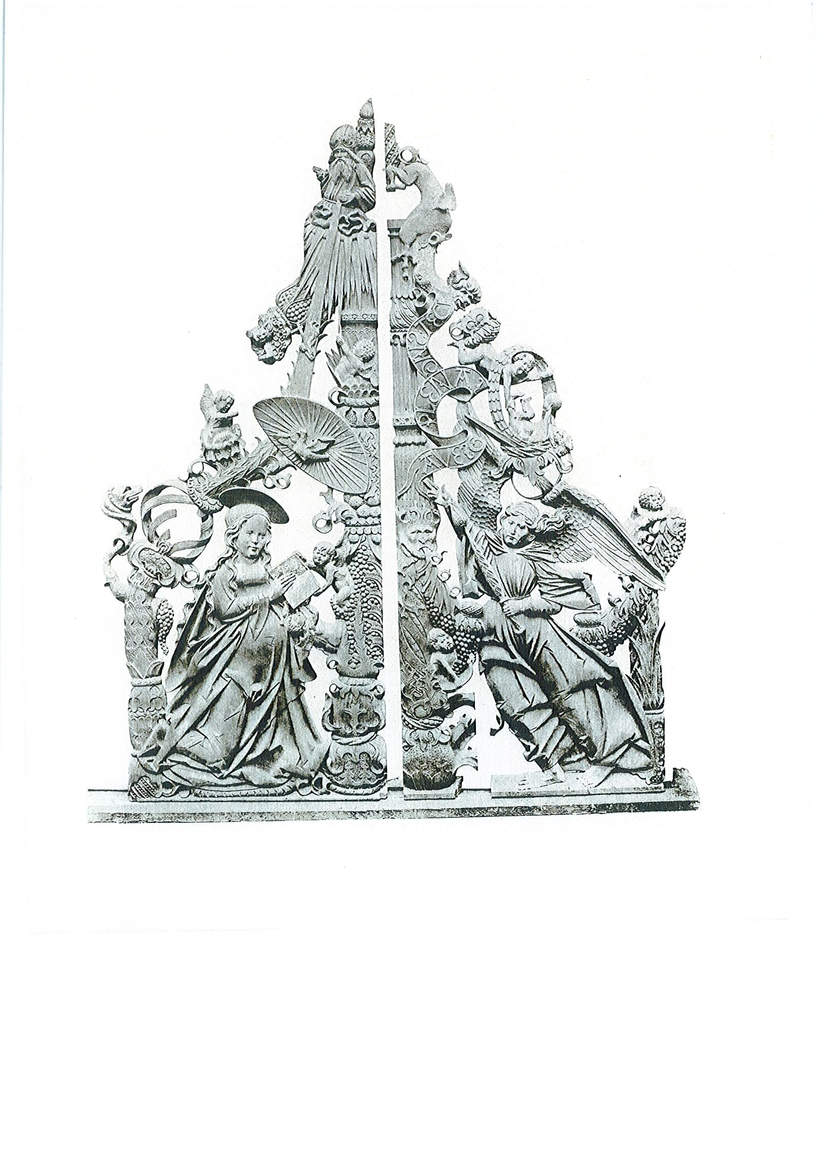 Detail: "Holzschnitzwerk aus der Bürgermeisterkapelle der Lübecker Marienkirche (Anfang 16. Jahrhundert)." Lichtdruck von Johannes Nöhring, veröffentlicht in Theodor Hach: "Die Anfänge der Renaissance in Lübeck" (dort nach dem Vorwort und vor Seite 1). Relief of Annunciation, originally made by Benedikt Dreyer for the top of the pulpit of the Marienkirche, today in the St.-Annen-Museum (Vgl: Albrecht: Corpus MA SH Band 1 Nr. 245: inscription: „AVE. G[RATIA]. PLENA. D[OMI]N[U]S. TECV[M]“)